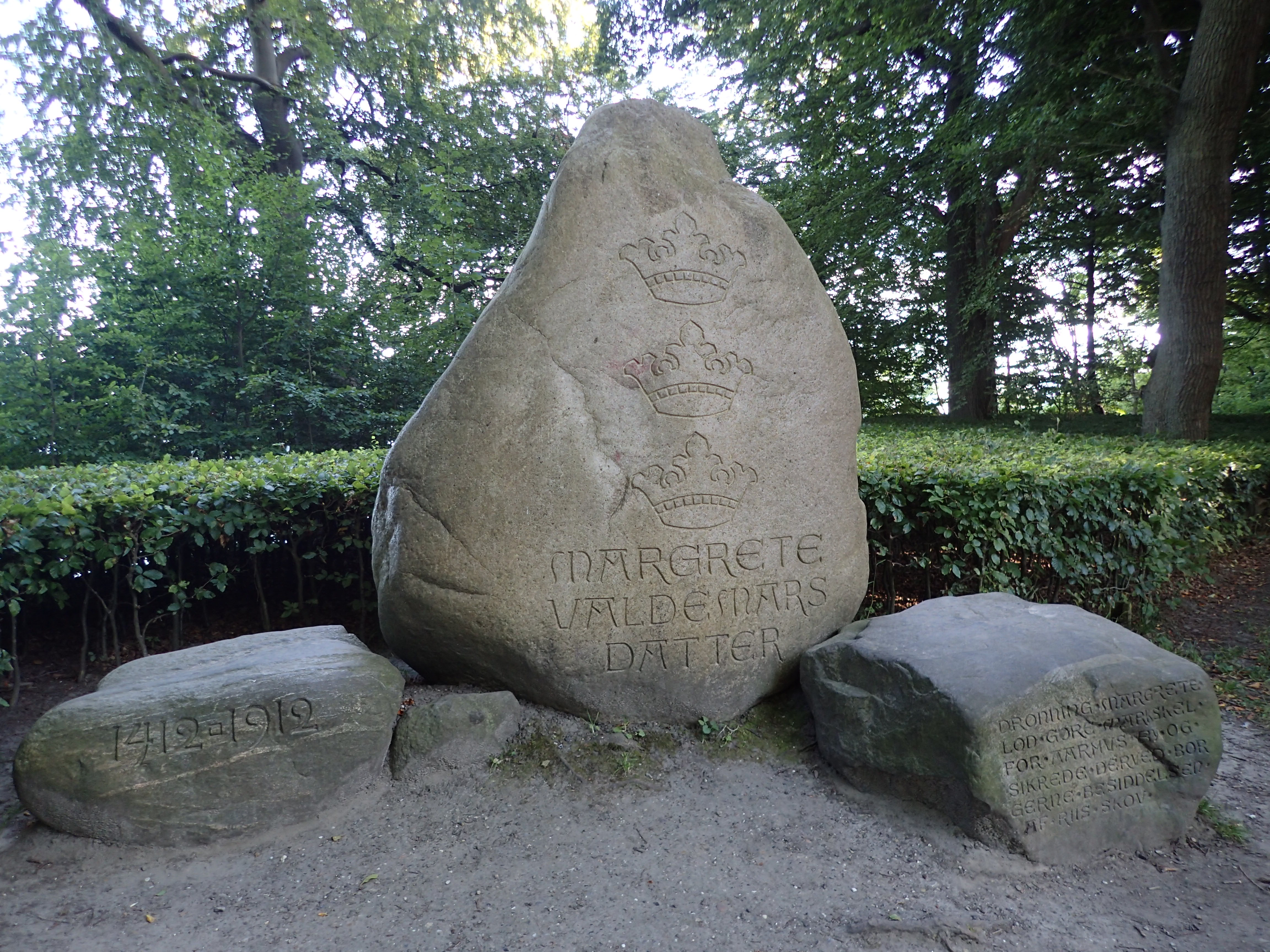 Mindesmærke for Dronning Margrete den 1. overdragelse af Riss Skov til Borgerne i Aarhus By. Alle tre sten indgår i mindesmærket der blev rejst i 1913. Overdragelsen nævnes på mindesmærket at skulle have fundet sted i 1412, men den skete formentlig i 1395.